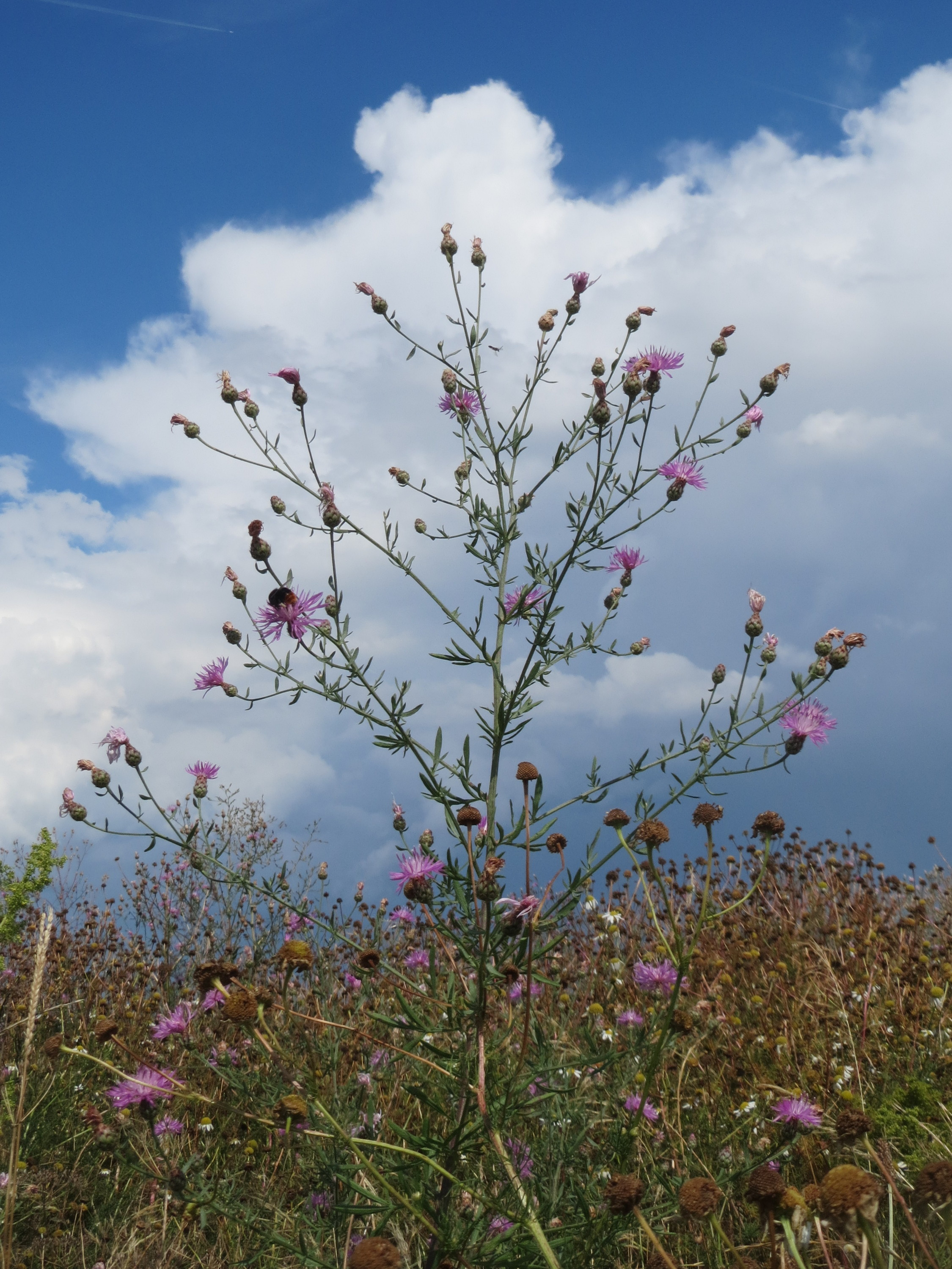 Rispen-Flockenblume (Centaurea stoebe) bei Wiesbaden-Erbenheim